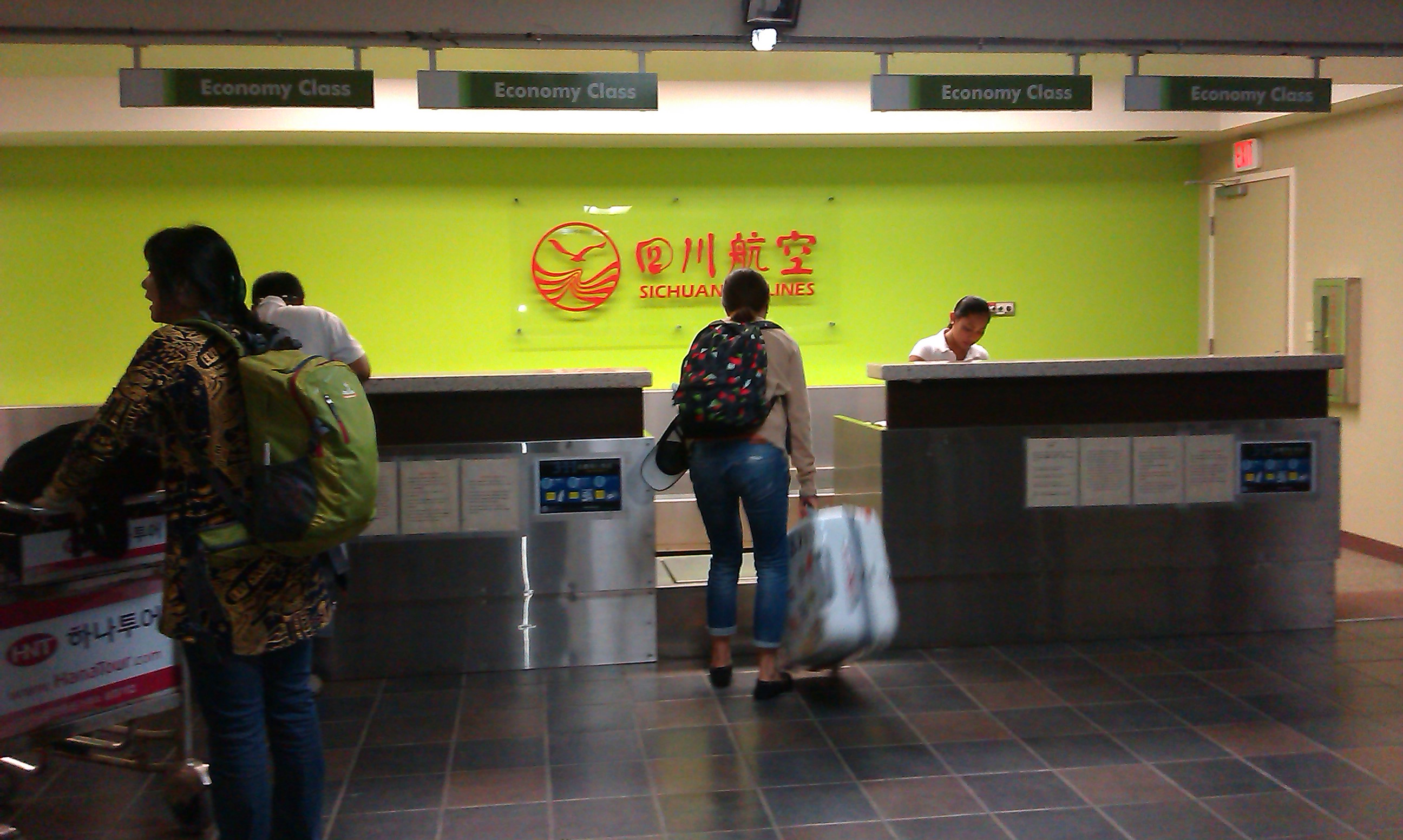 四川航空值机柜台（塞班国际机场）